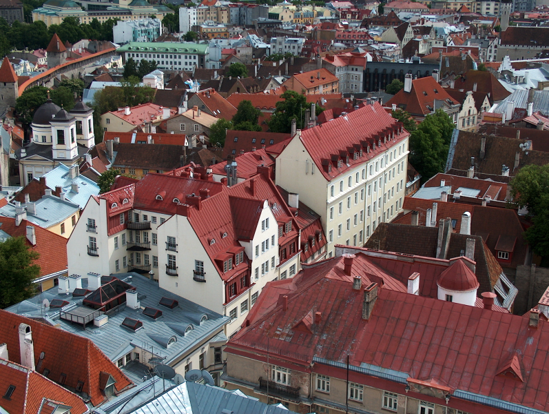 Peapööritus Oleviste kiriku katuseäärel.